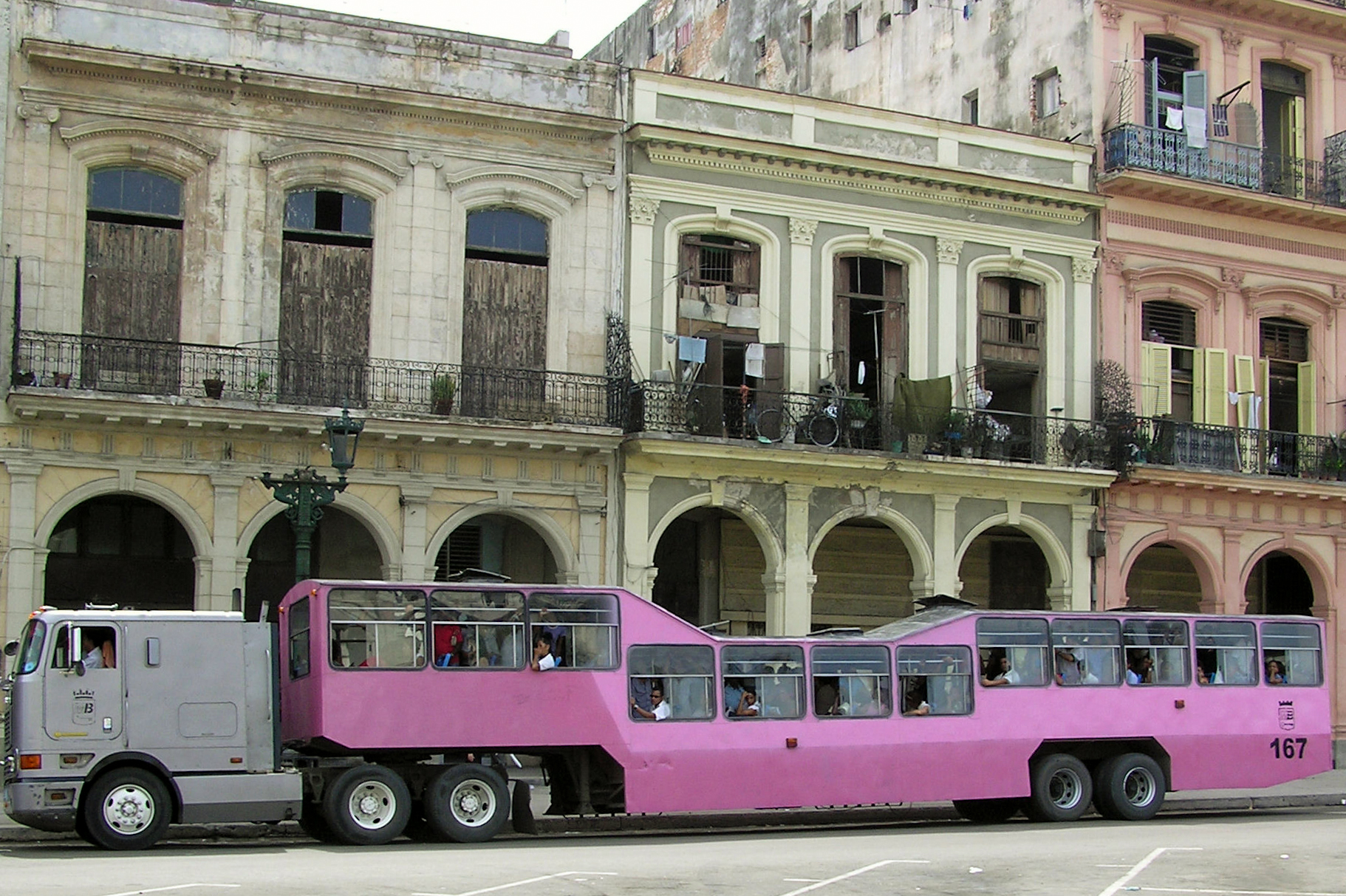 Bus surdimensionné appelé "camelito" dans le quartier du Capitole à La Havane - Cuba